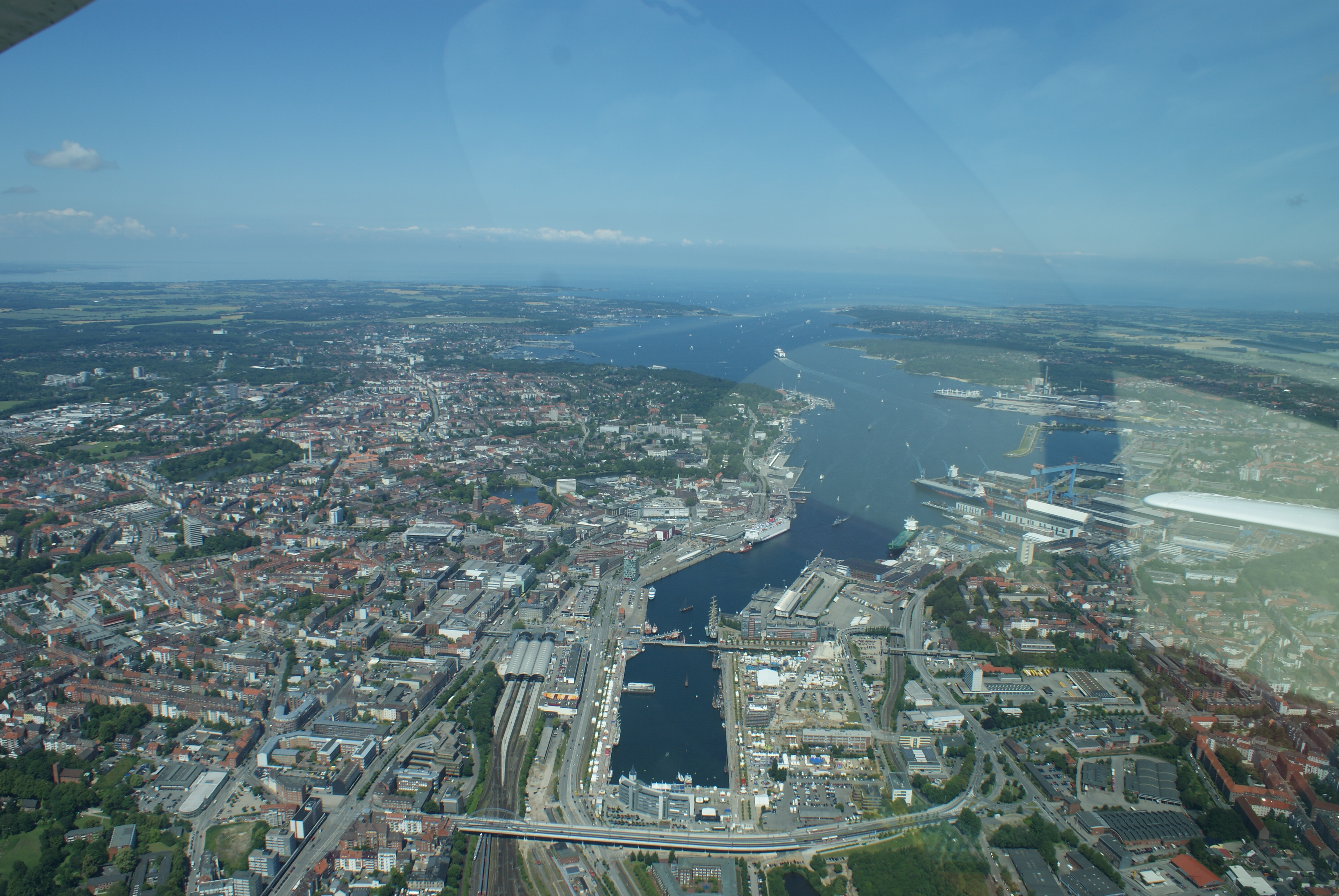 Kiel aus der Luft